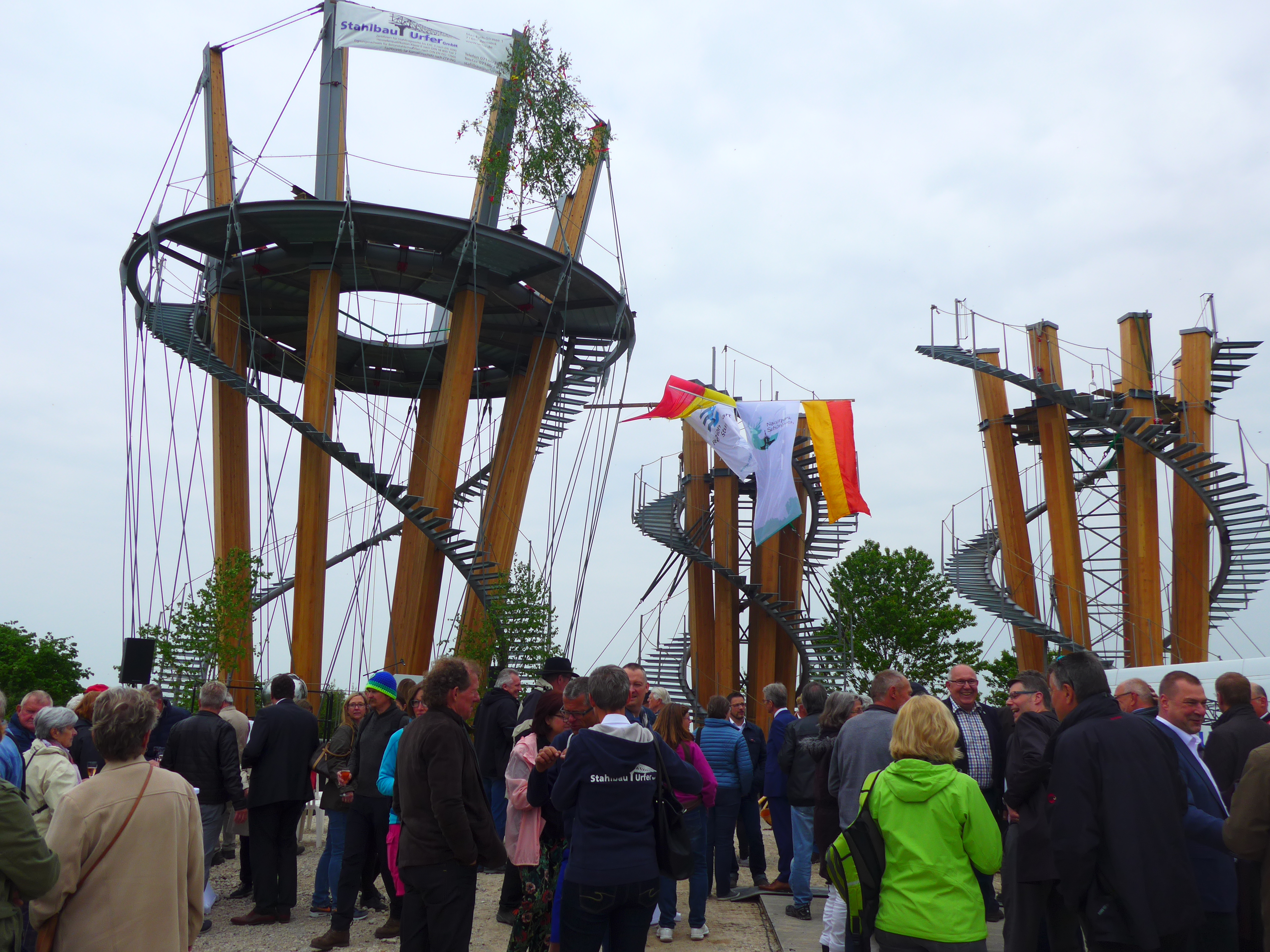 Richtfest des Schönbuchturms auf dem Stellberg